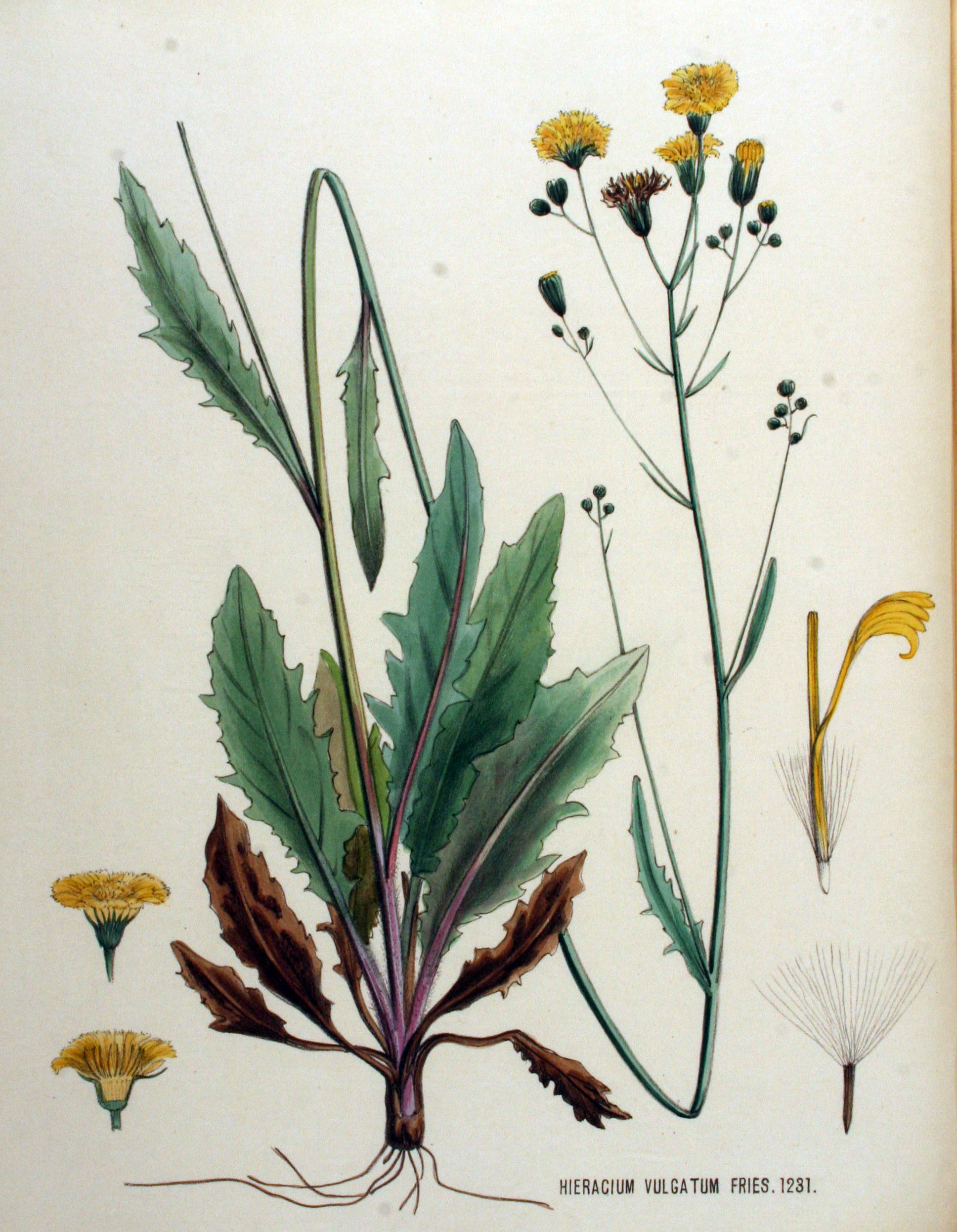 Hieracium lachenalii C.C. Gmel. (Syn. Hieracium vulgatum Fries.)